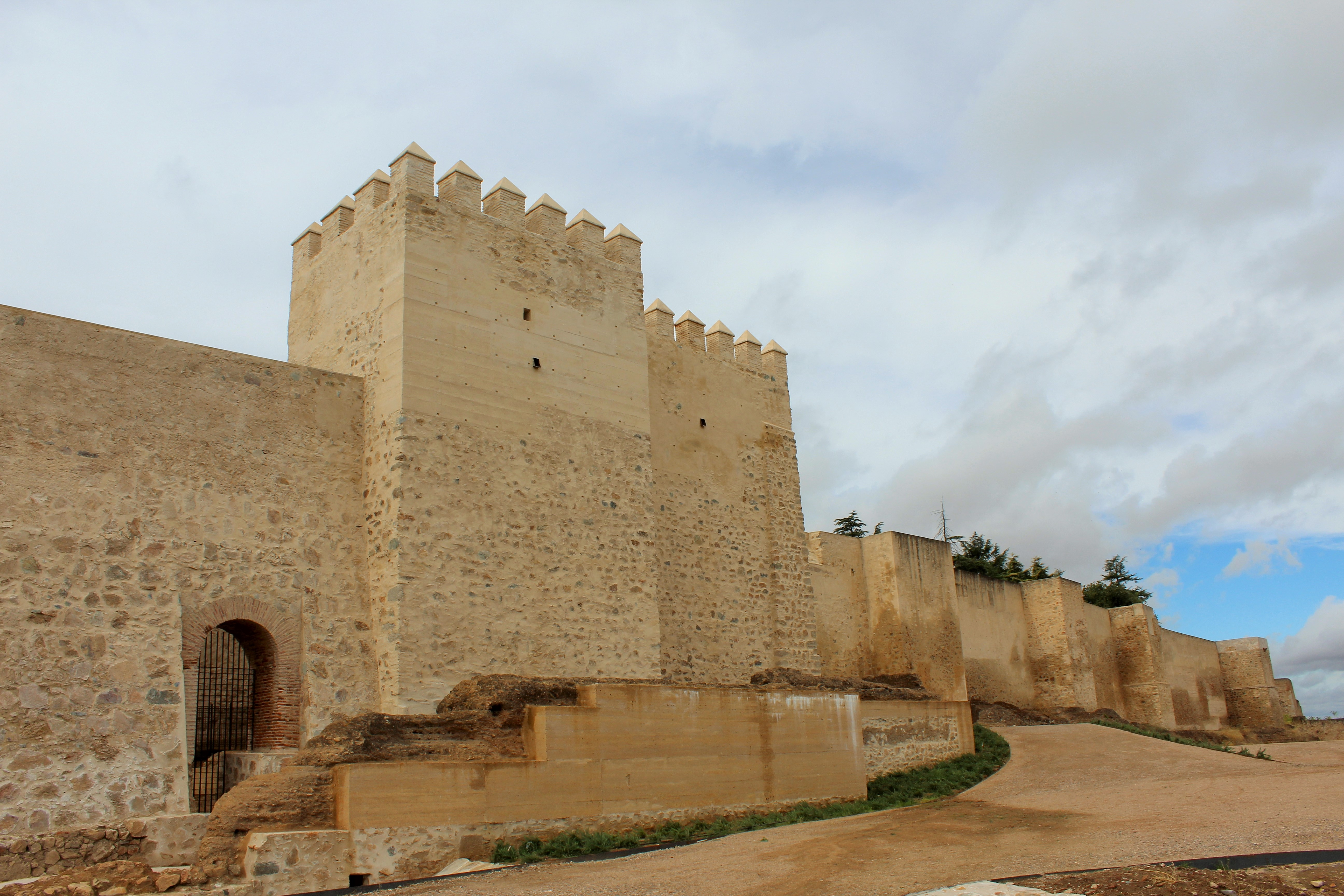 Entronque del baluarte con la muralla de La Alcazaba.